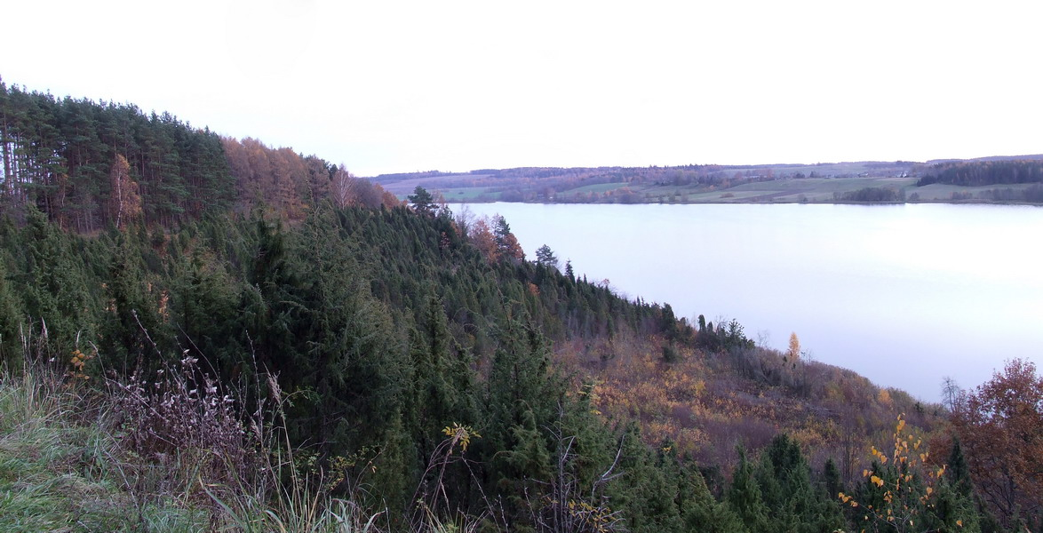 Kadagių slėnis Kauno marių regioninime parke.